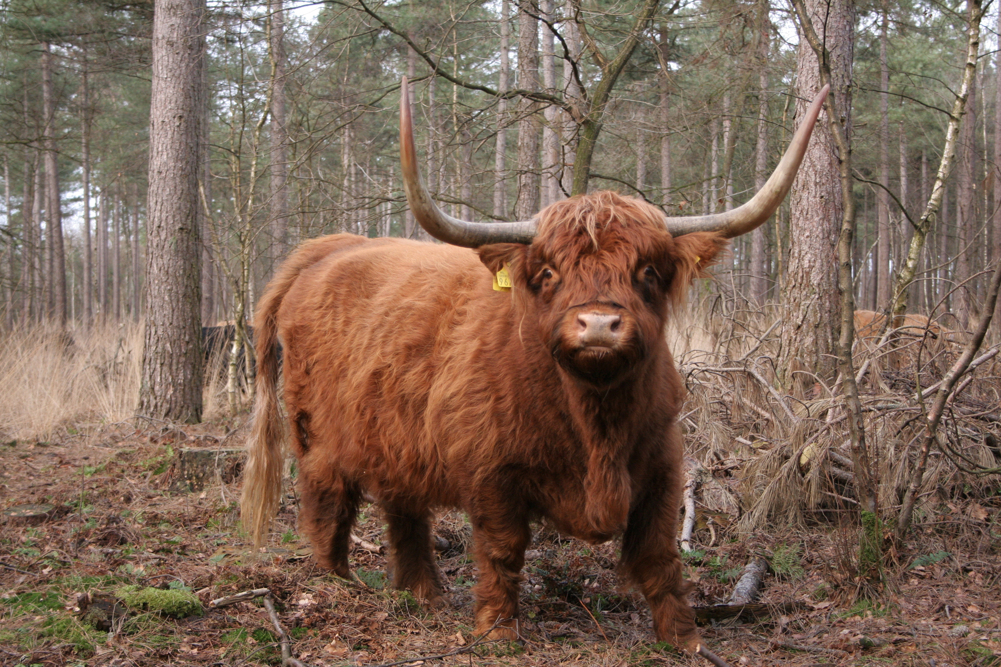 Schotse Hoolanders op Huis ter Heide